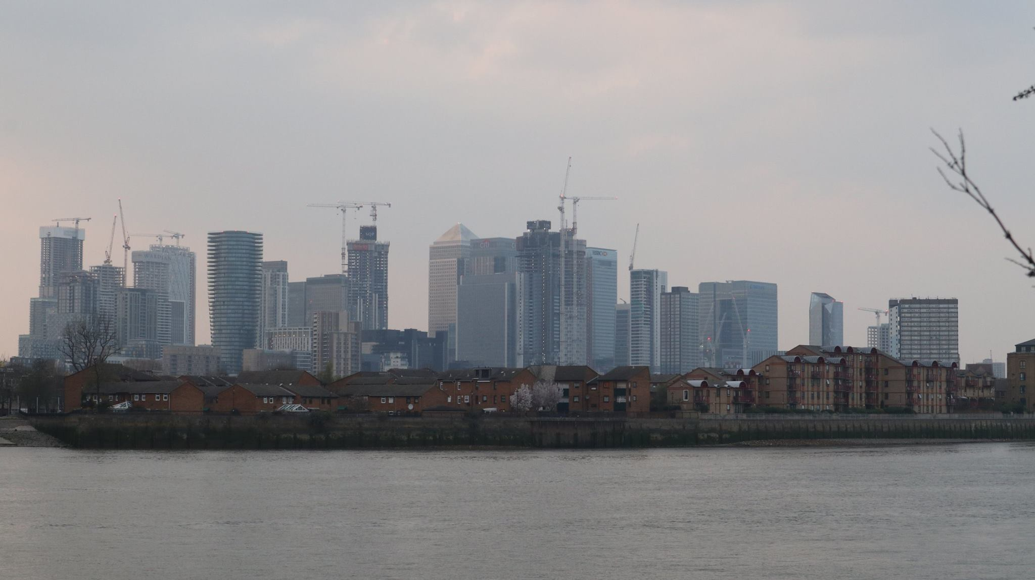 Důležitým zásahem při obnově londýnského přístavu, bylo vyčlenění podnikové zóny v roce 1982, oblasti, ve které byly podniky osvobozeny od daně z nemovitostí. To bylo nápomocné při zahájení výstavbového boomu nových luxusních domů.